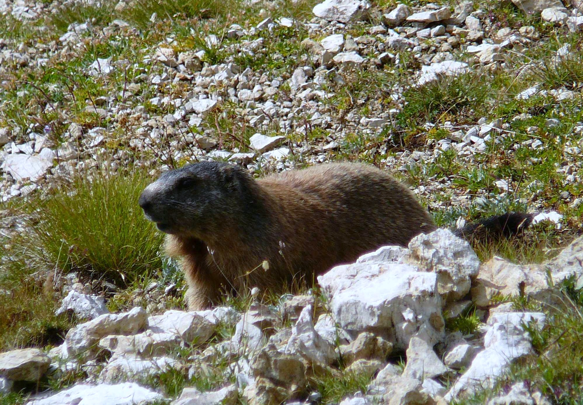 Marmotta sullo Sciliar